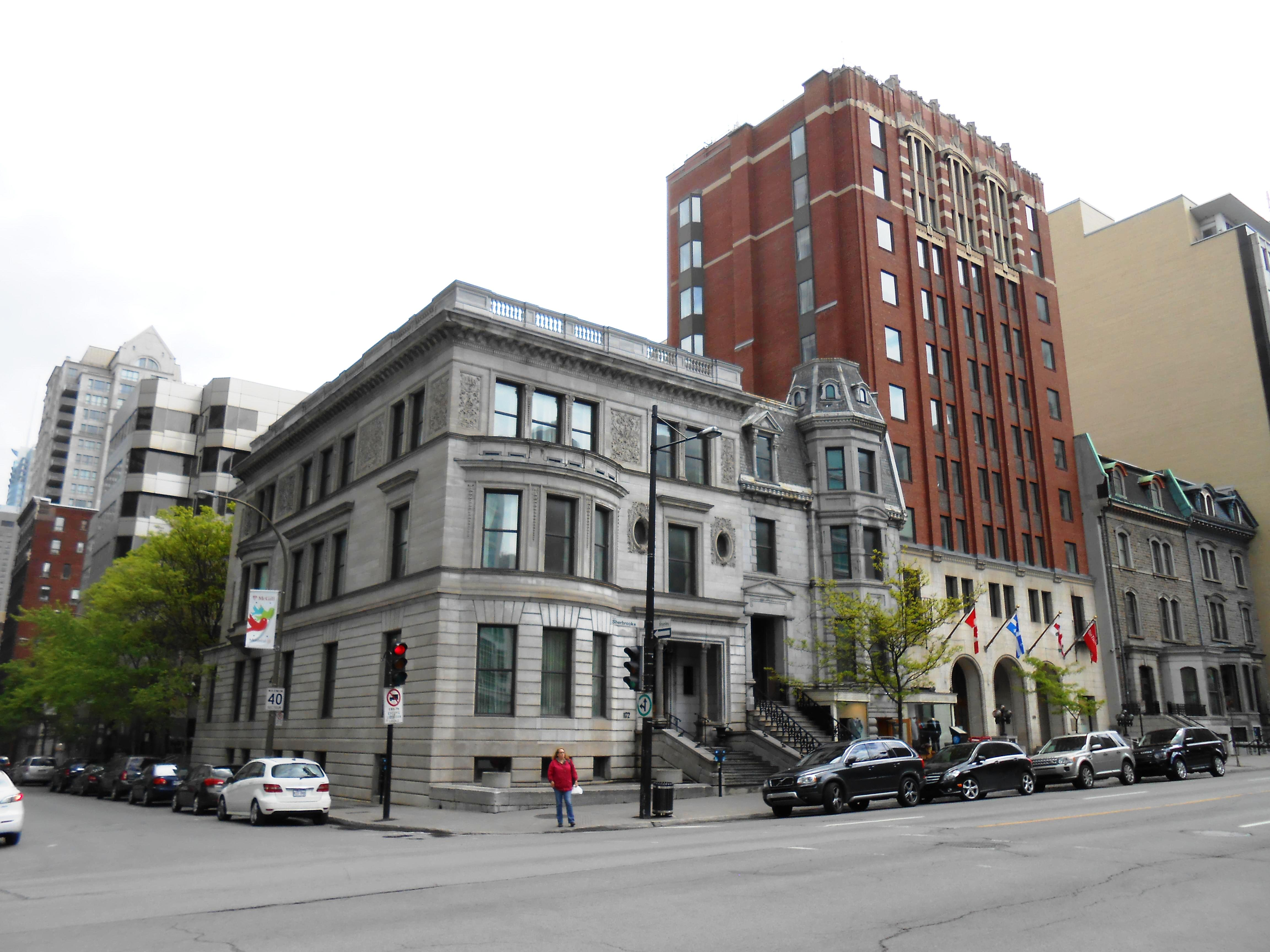 Maison Lord-Atholstan, 1172, rue Sherbrooke Ouest Hôtel Berkeley, 1188, rue Sherbrooke Ouest, Montréal